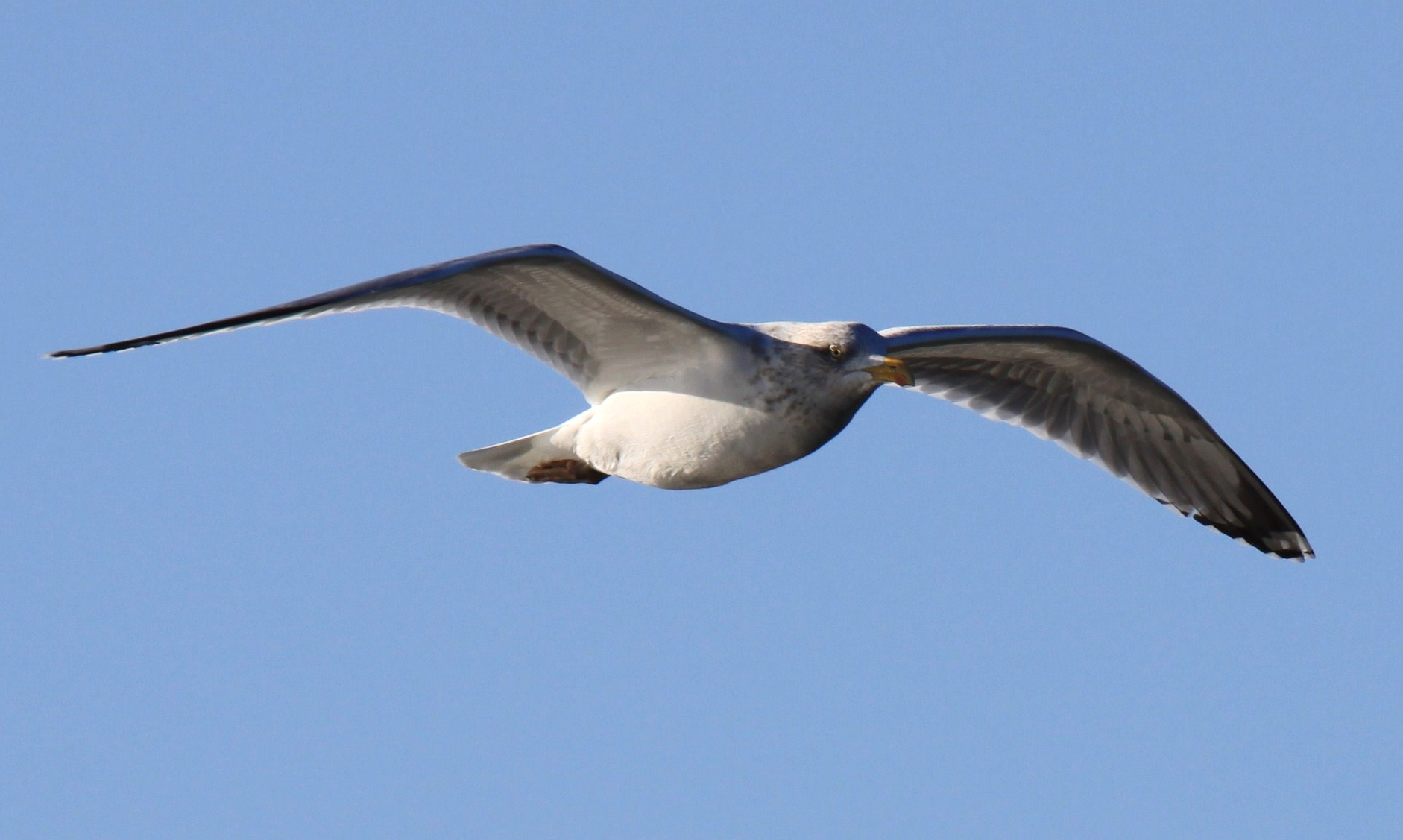 Ce goéland en vol permet bien de remarquer les ailes en W inversé (ailes en forme brisée). Cette photographie a été prise au Port de Plaisance des Minimes à La Rochelle (France).